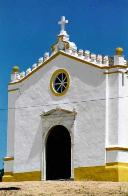 fotografia da Igreja da Nossa Senhora da Conceição em Monforte